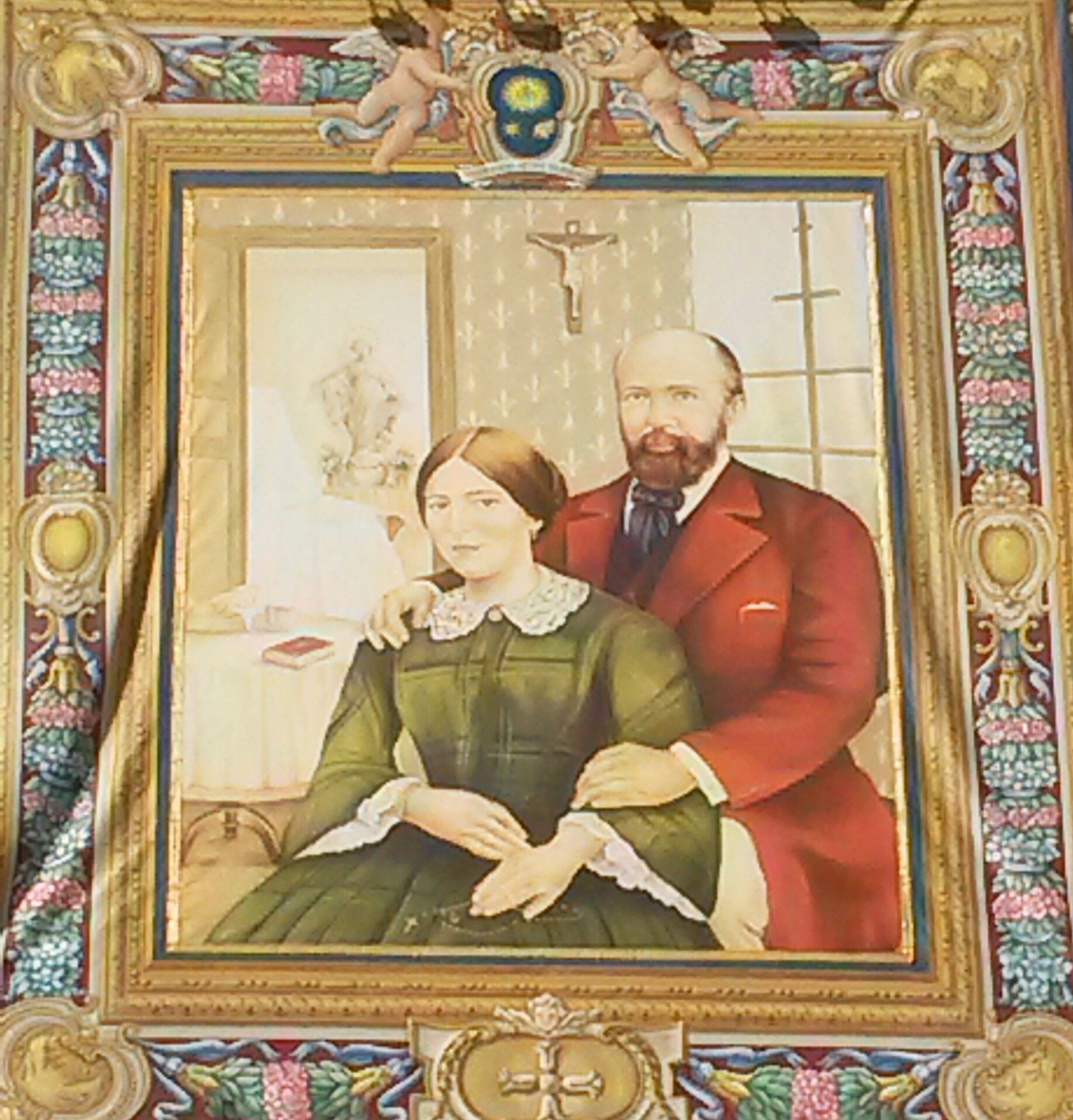 Fotografía tomada en la misa de canonización de los padres de Teresita del Niño Jesús en la Plaza de San Pedro en el Vaticano